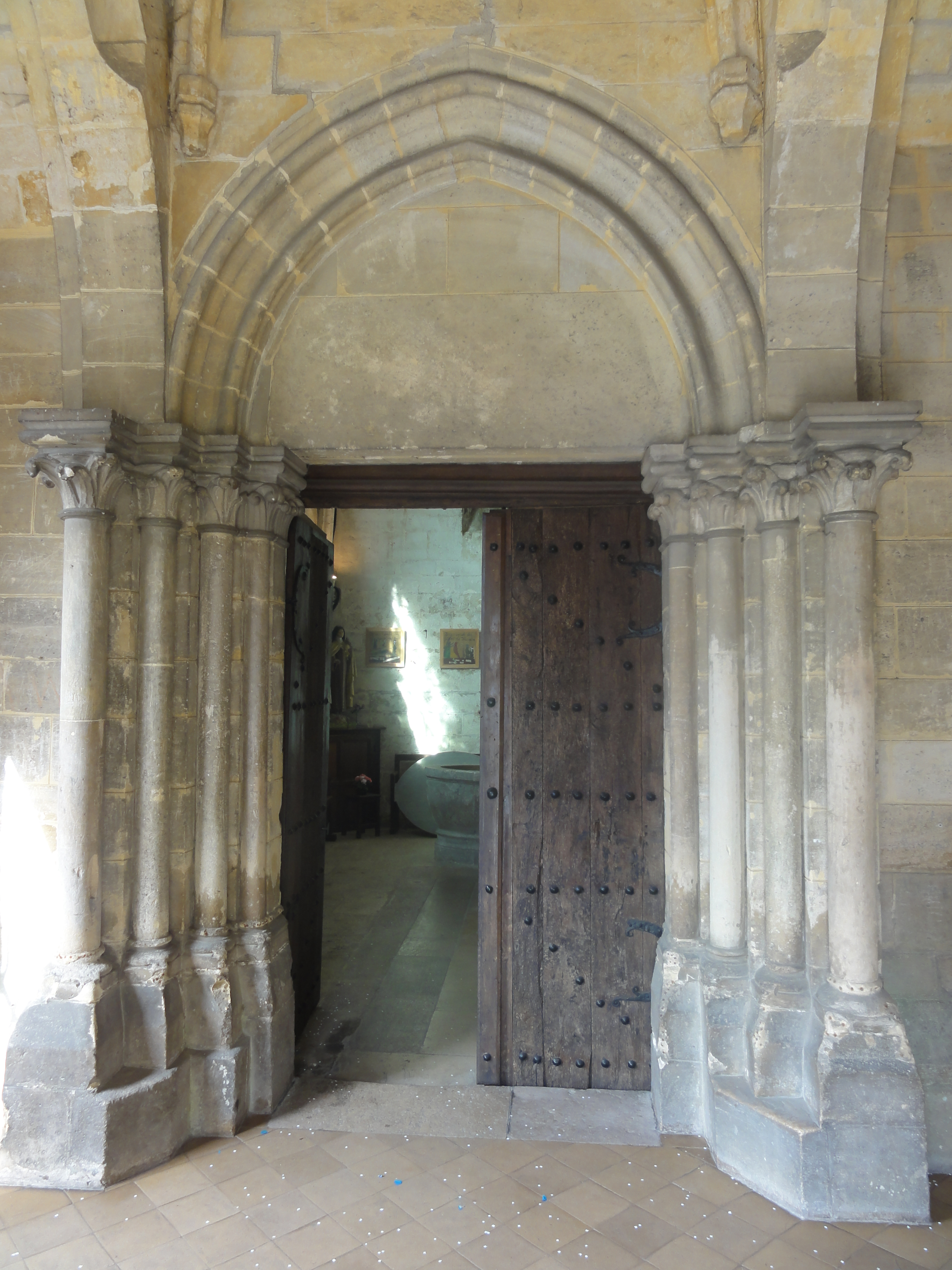 Portail (première travée, côté sud).